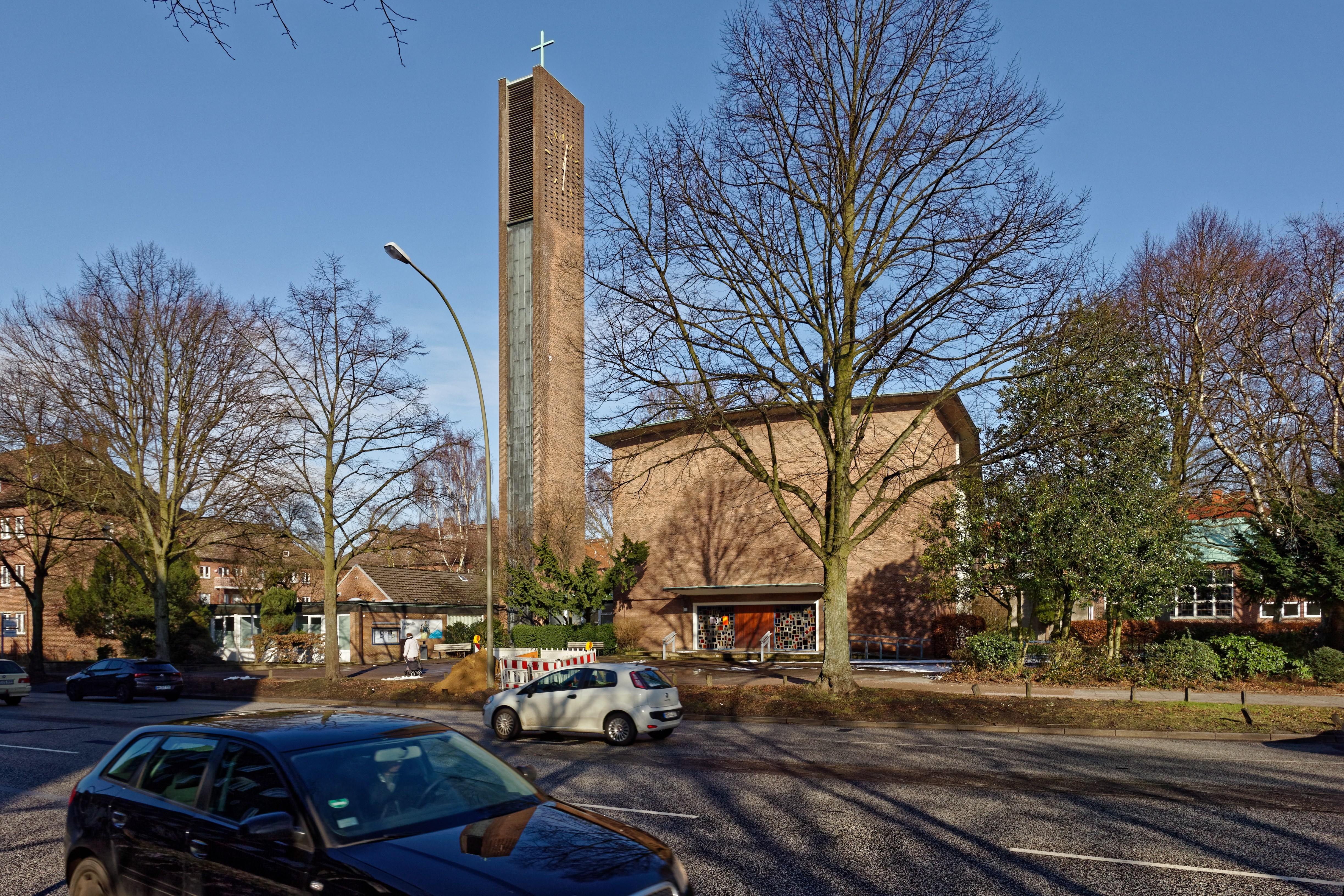 Paul-Gerhardt-Kirche Hamburg-Winterhhude, Ansicht vom Ring 2